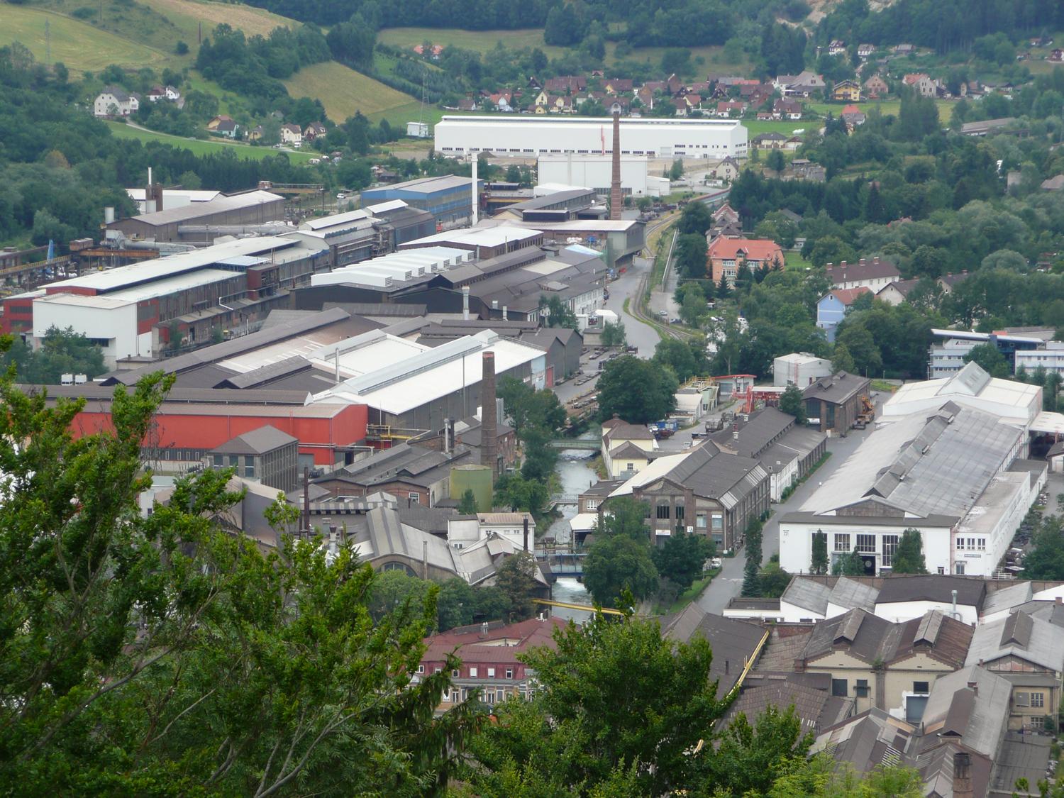 Böhler-Werk Kapfenberg-Redfeld